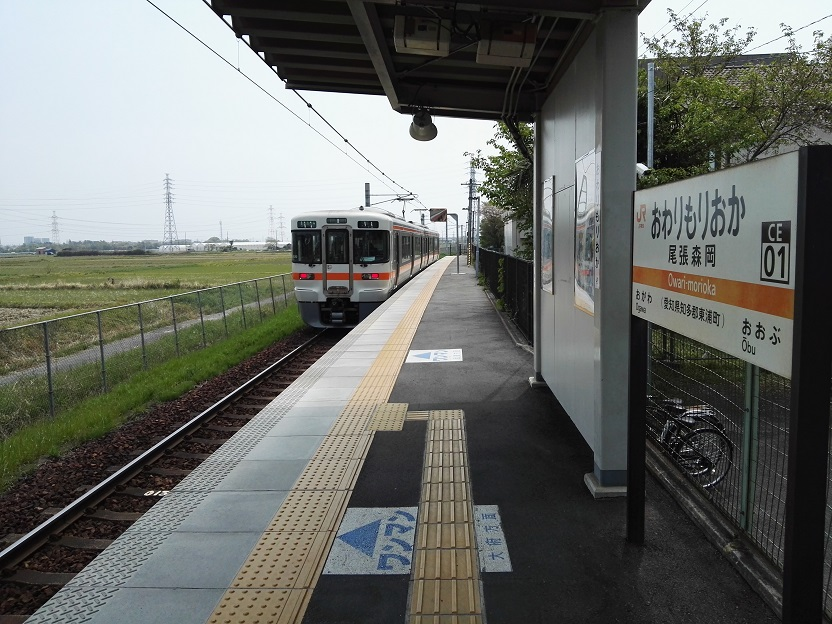 Owari-morioka station platform